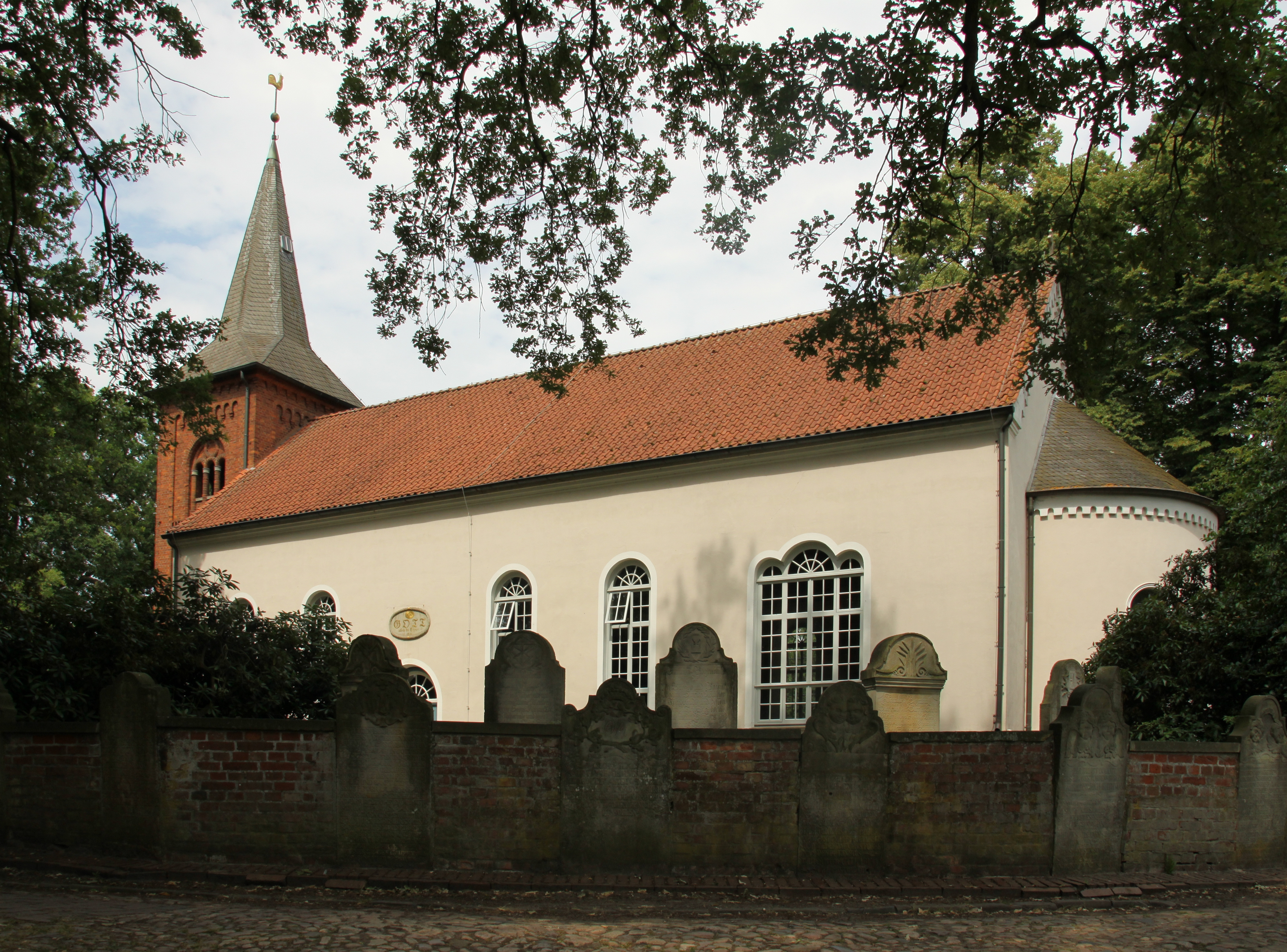 Fischerhude Church